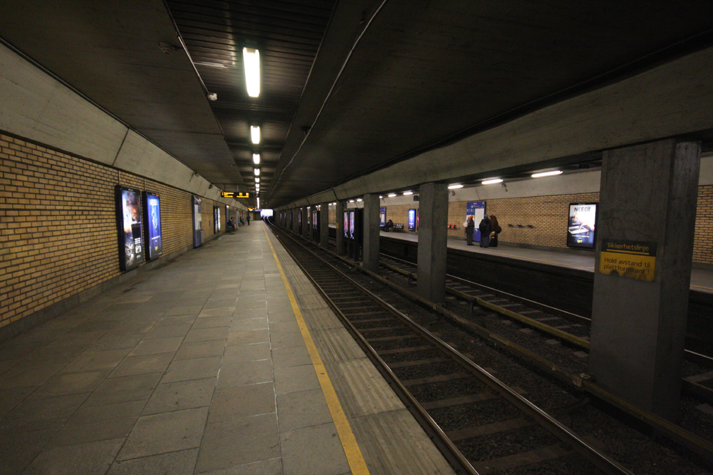 Helsfyr T-banestasjon sett fra vestenden på Spor 2. I retning mot Brynseng.